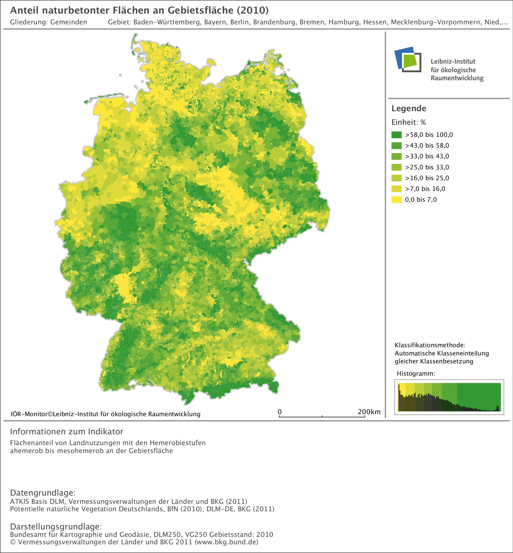 Flächenanteil von Landnutzungen mit den Hemerobiestufen ahemerob bis mesohemerob an der Gemeindefläche Der Begriff Hemerobie leitet sich von den griechischen Wörtern hémeros (gezähmt, kultiviert) und bíos (leben) ab. Die Hemerobie stellt die Gesamtheit aller Eingriffe des Menschen in den Naturhaushalt dar und kann als ein inverses Maß der Naturnähe verstanden werden, wenn die anthropogenen Eingriffe reversibel sind. Den Flächennutzungen bzw. Bodenbedeckungen werden Werte folgender 7-stufigen Hemerobieklassifikation zugeordnet: - Stufe 1: ahemerob (nicht kulturbeeinflusst), - Stufe 2: oligohemerob (schwach kulturbeeinflusst), - Stufe 3: mesohemerob (mäßig kulturbeeinflusst), - Stufe 4: beta-euhemerob (mäßig-stark kulturbeeinflusst), - Stufe 5: alpha-euhemerob (stark kulturbeeinflusst), - Stufe 6: polyhemerob (sehr stark kulturbeeinflusst) und - Stufe 7: metahemerob (übermäßig stark kulturbeeinflusst / Biozönose zerstört). Von besonderem naturschutzfachlichem Interesse für die Freiraumentwicklung sind naturbetonte Flächen der Hemerobiestufen ahemerob bis mesohemerob, da diese keinen oder nur mäßigen periodischen Eingriffen des Menschen unterliegen. Hierzu zählen standortgerechte und standortfremde Wälder, Gehölze und Hecken, Sümpfe und Moore. Der restliche Anteil der Bezugsfläche ist folglich mindestens mäßig stark kulturbeeinflusst.